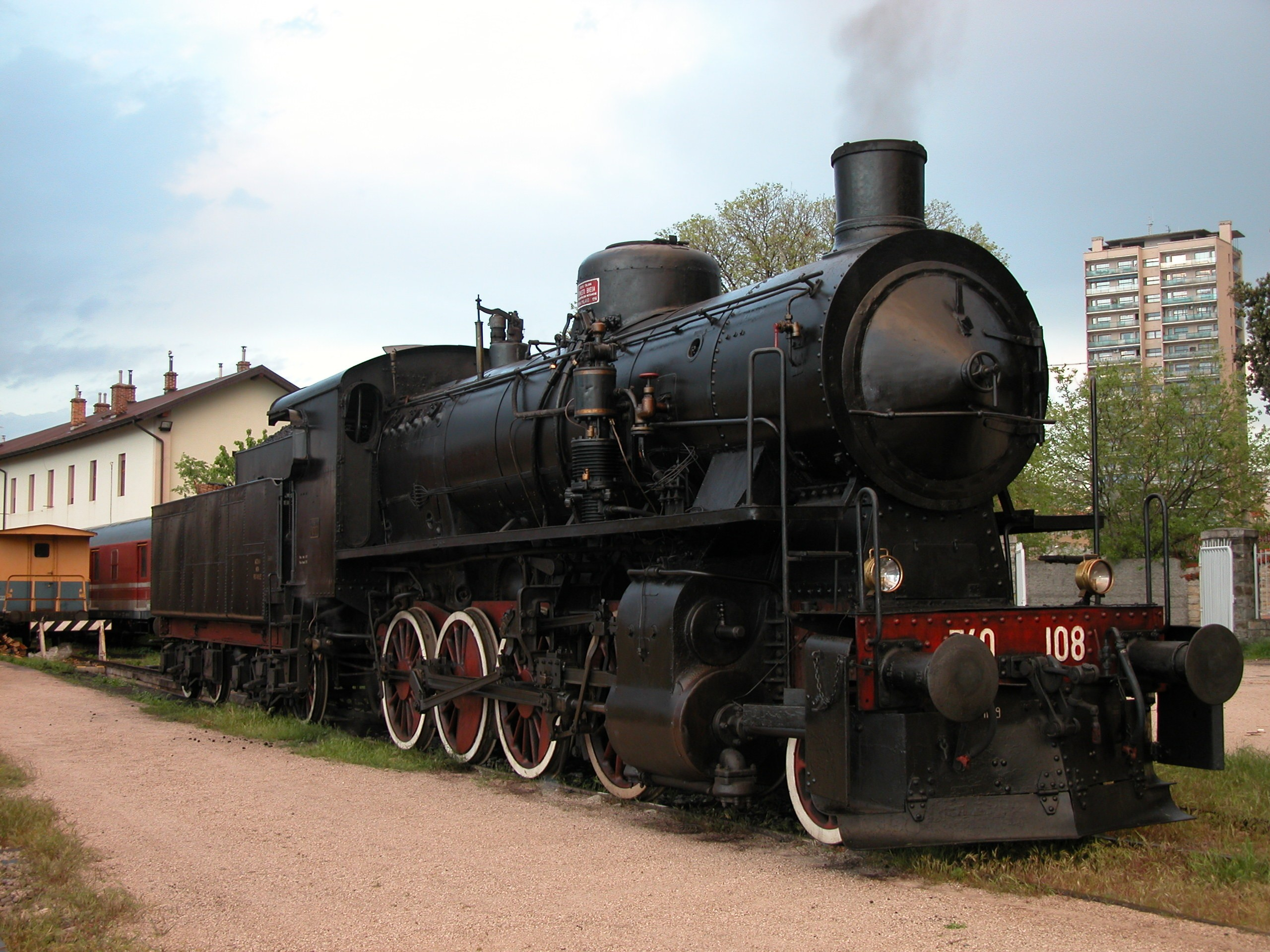 FS 740.108 locomotive